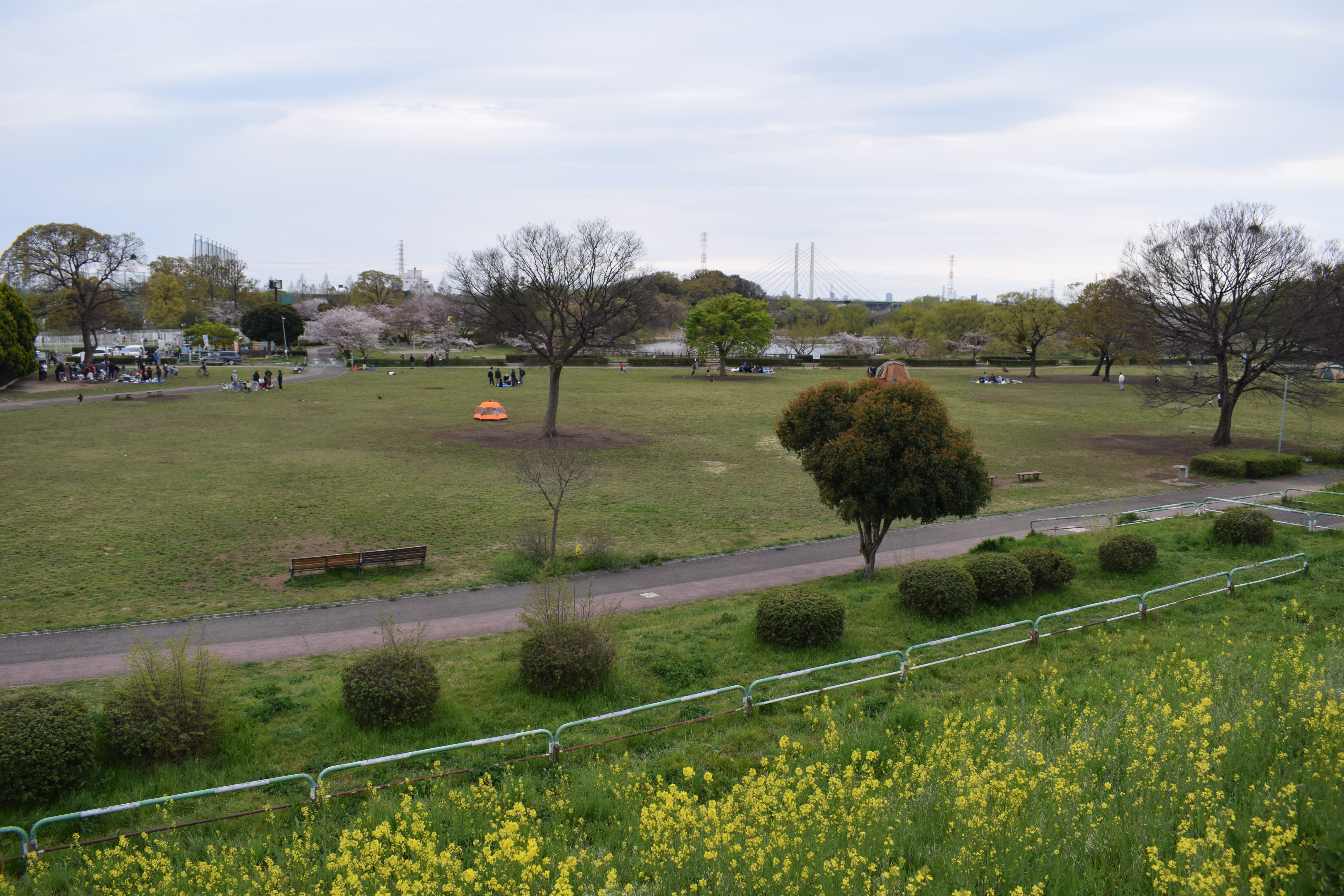 彩湖・道満グリーンパークのバーベキュー広場。埼玉県戸田市重瀬。遠くに見える橋は幸魂大橋。南の方向を見る。地図はこちら。 Nikon D5300 Ik heb de GPS coördinaten toegevoegd. De foutenmarge moet tussen ±5 meter liggen. --トトト (talk) 12:15, 17 April 2019 (UTC)